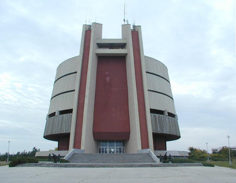 Панорама "Плевенска епопея".